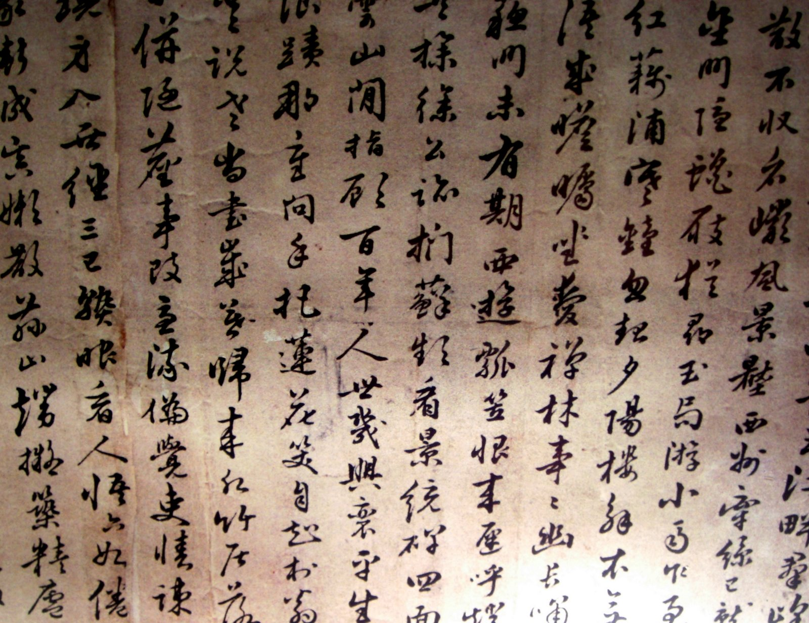 Manuscrit en chinois au Vietnam.